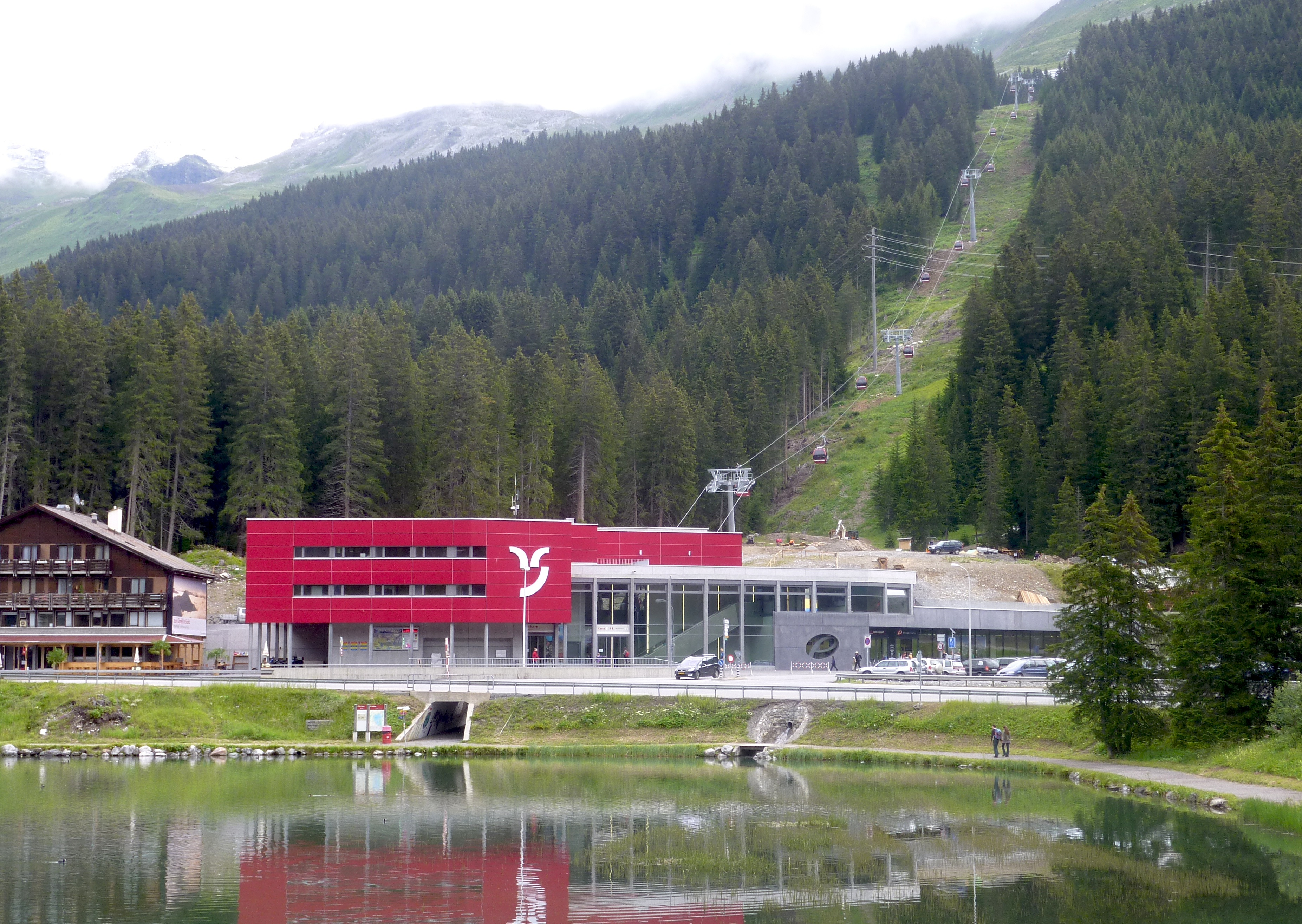 Lenzerheide :Talstation Rothornbahn